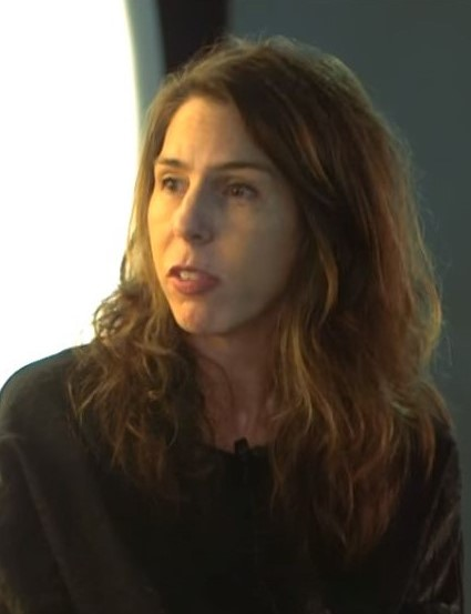 Os Dias do FOLIO • 21 out. • Mesa de Autores com Rachel Kushner e Karla Suarez, moderada por José Mário Silva • Tenda de Autores